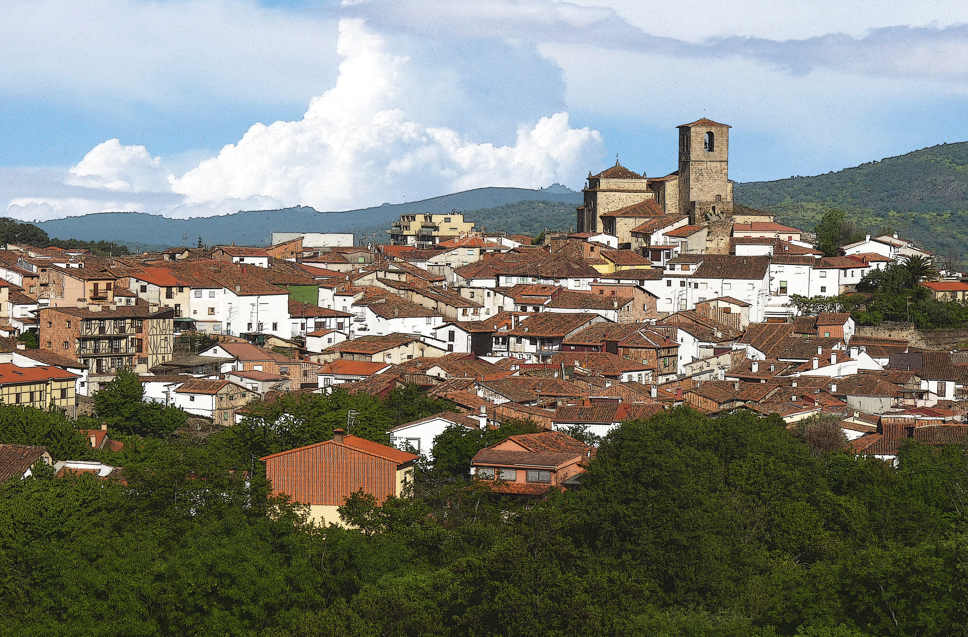 Panoramica del pueblo de Hervas en Caceres